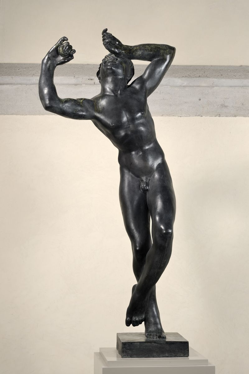 Photos prise lors du Wiknic à Lyon au Musée des Beaux-Arts le 13 avril 2018.